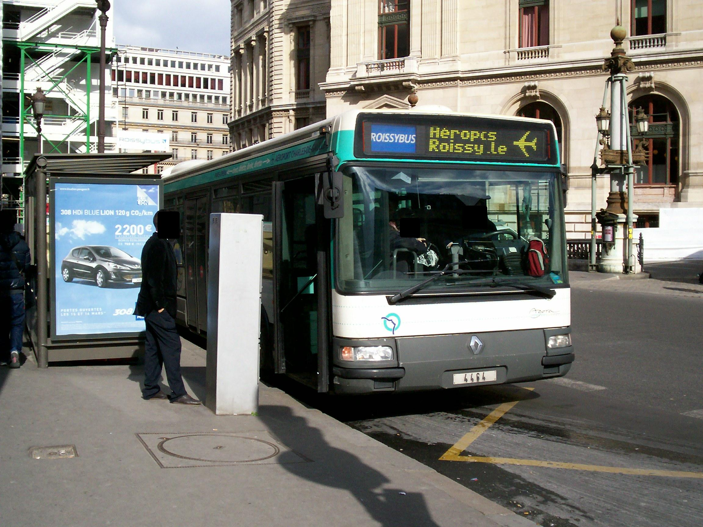 Bus Agora L Euro2 à Paris-Opéra